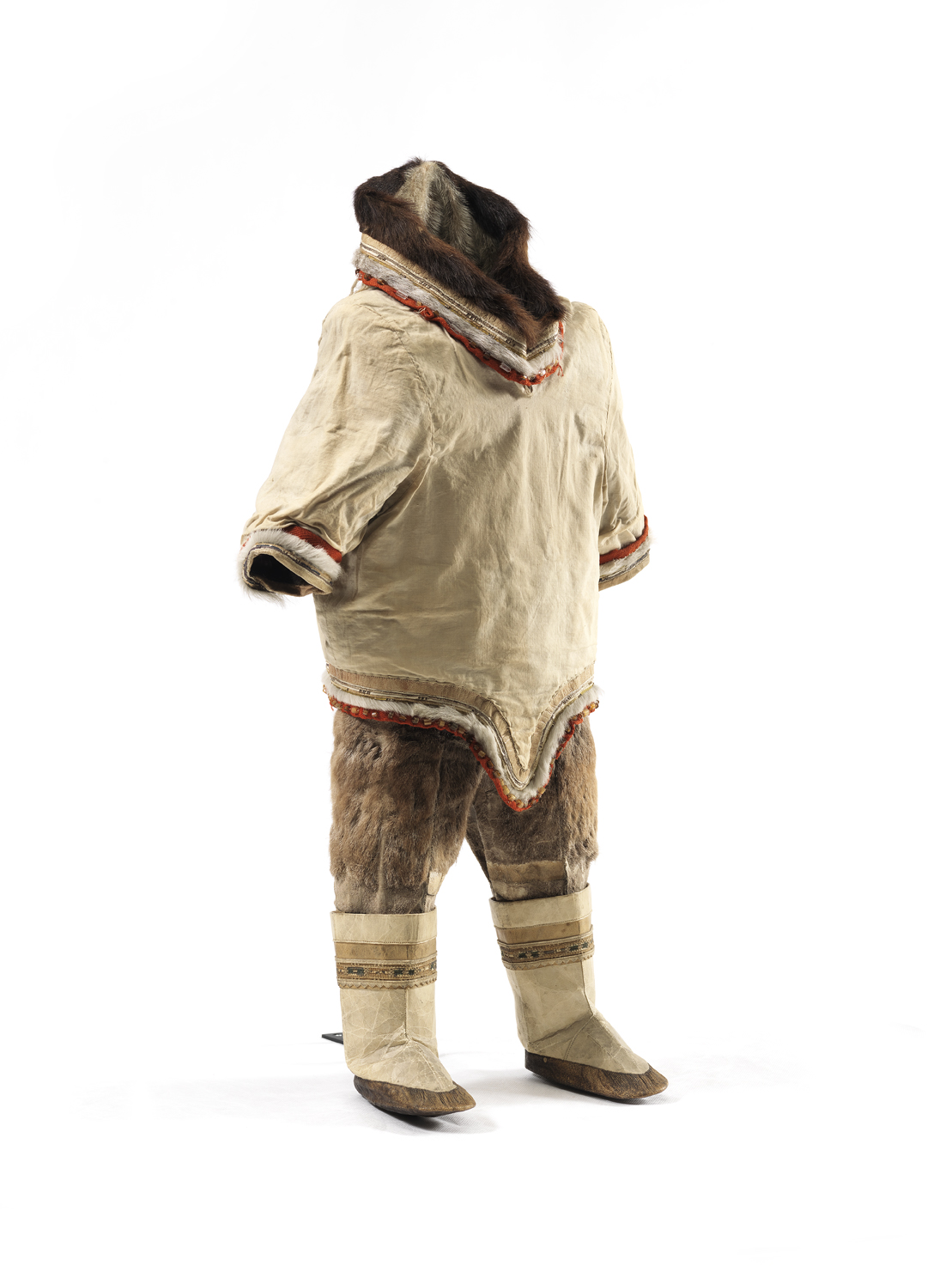 Pels med lille hætte af sælskind og hundeskind med bomuldsbetræk. Pelsen har snipper for og bag. Snipperne er forsynet med en kant af uldbånd. Bukser af rensdyrskind og afhåret, farvet sælskind. Støvler af afhåret og farvet sælskind. Strømper af sælskind. Fra området ved Nuuk. Fra premierløjtnant Gustav Holm 1892. Parka of sealskin and dog skin with cotton covering, small hood and flaps at front and back. The flaps have trimmings of wool bands. Trousers of caribou skin and depilated, dyed sealskin. Boots of depilated and dyed sealskin. Stockings of sealskin. From the area around Nuuk. From First Lieutenant Gustav Holm, 1892. Foto: Roberto Fortuna